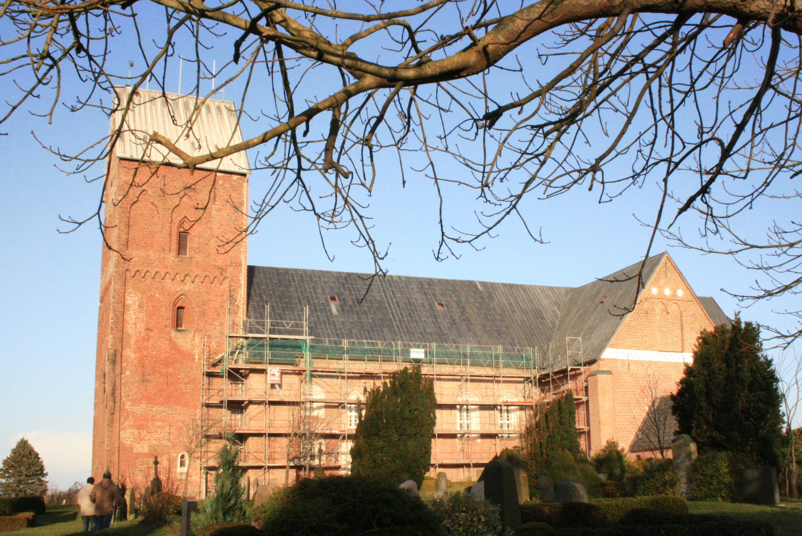 Südansicht St. Johannis-Kirche in Nieblum auf Föhr